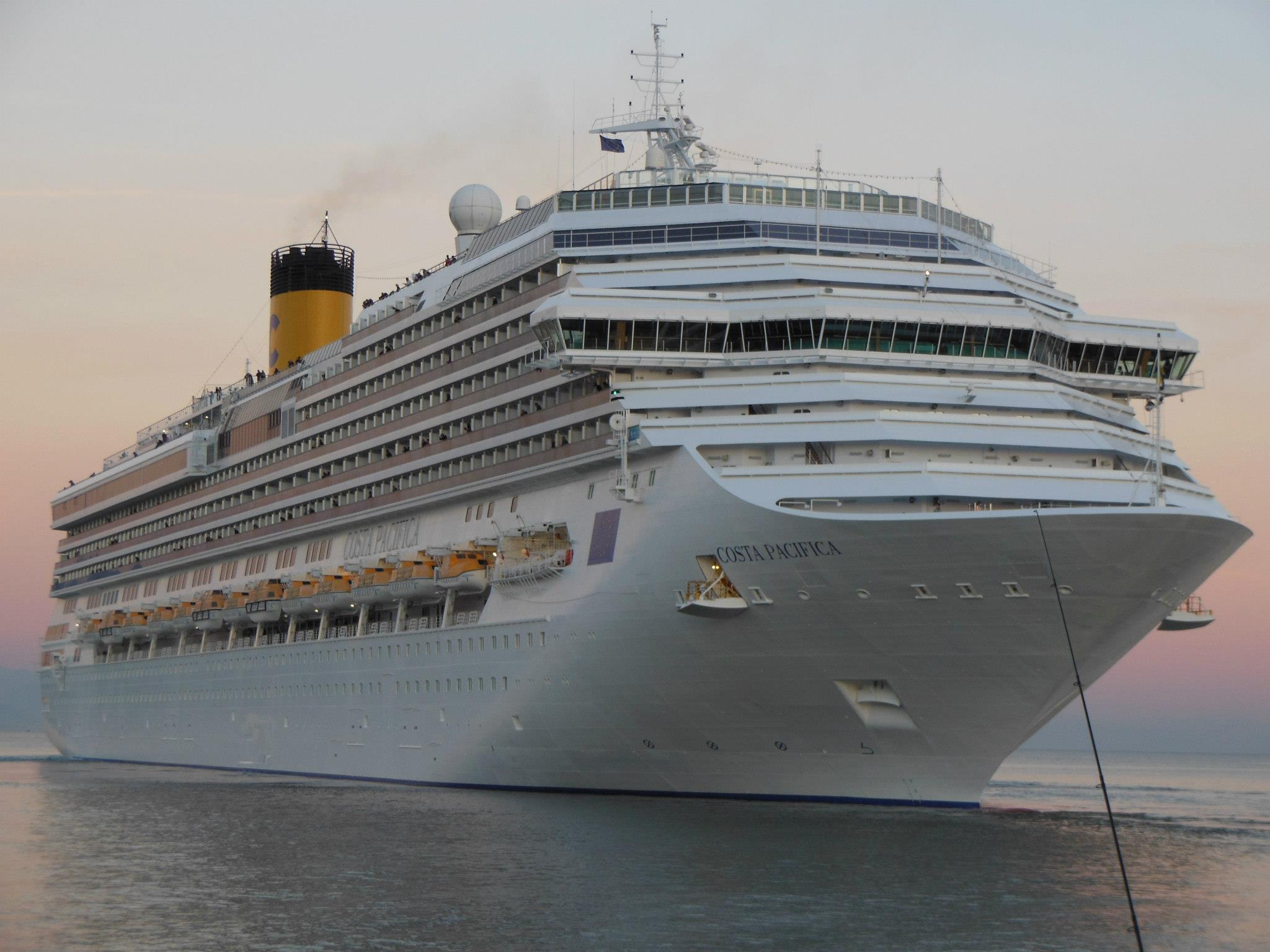 Le Costa Pacifica en manoeuvre à Naples